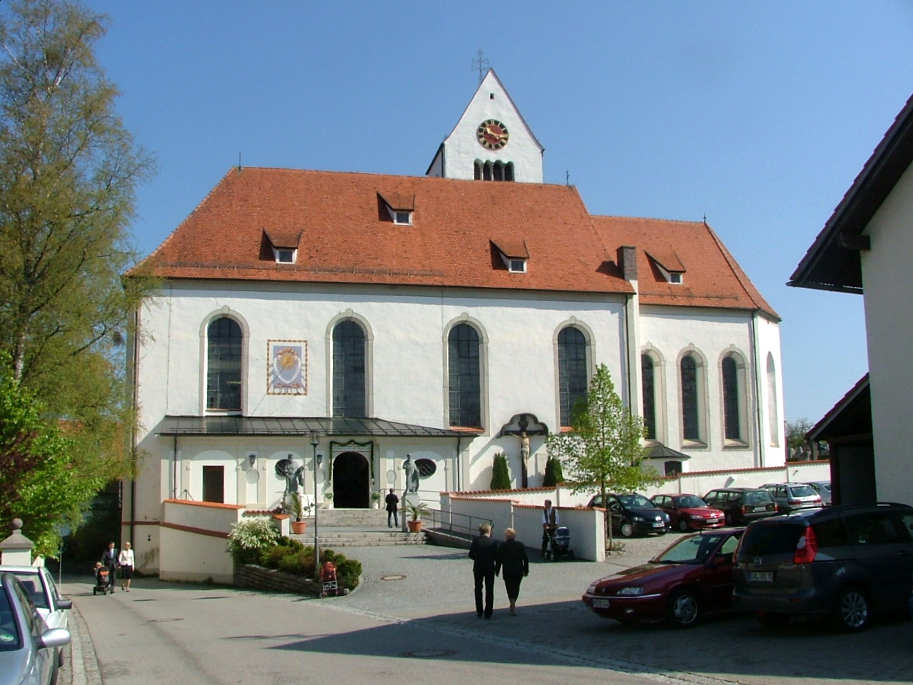 Peter und Paul , Stötten